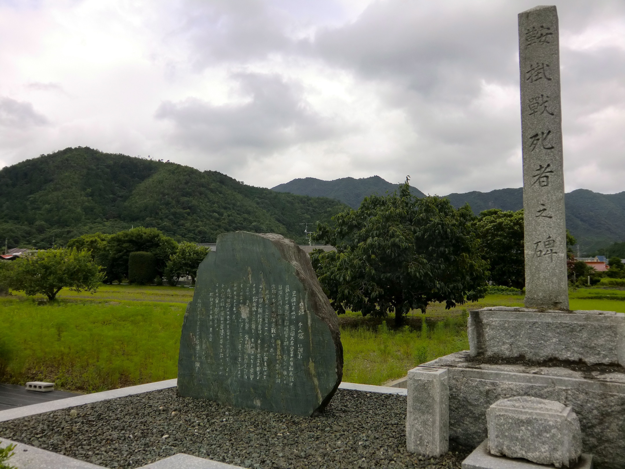 岩国市玖珂町の鞍掛合戦古戦場跡（千人塚）と鞍掛山・蓮華山。